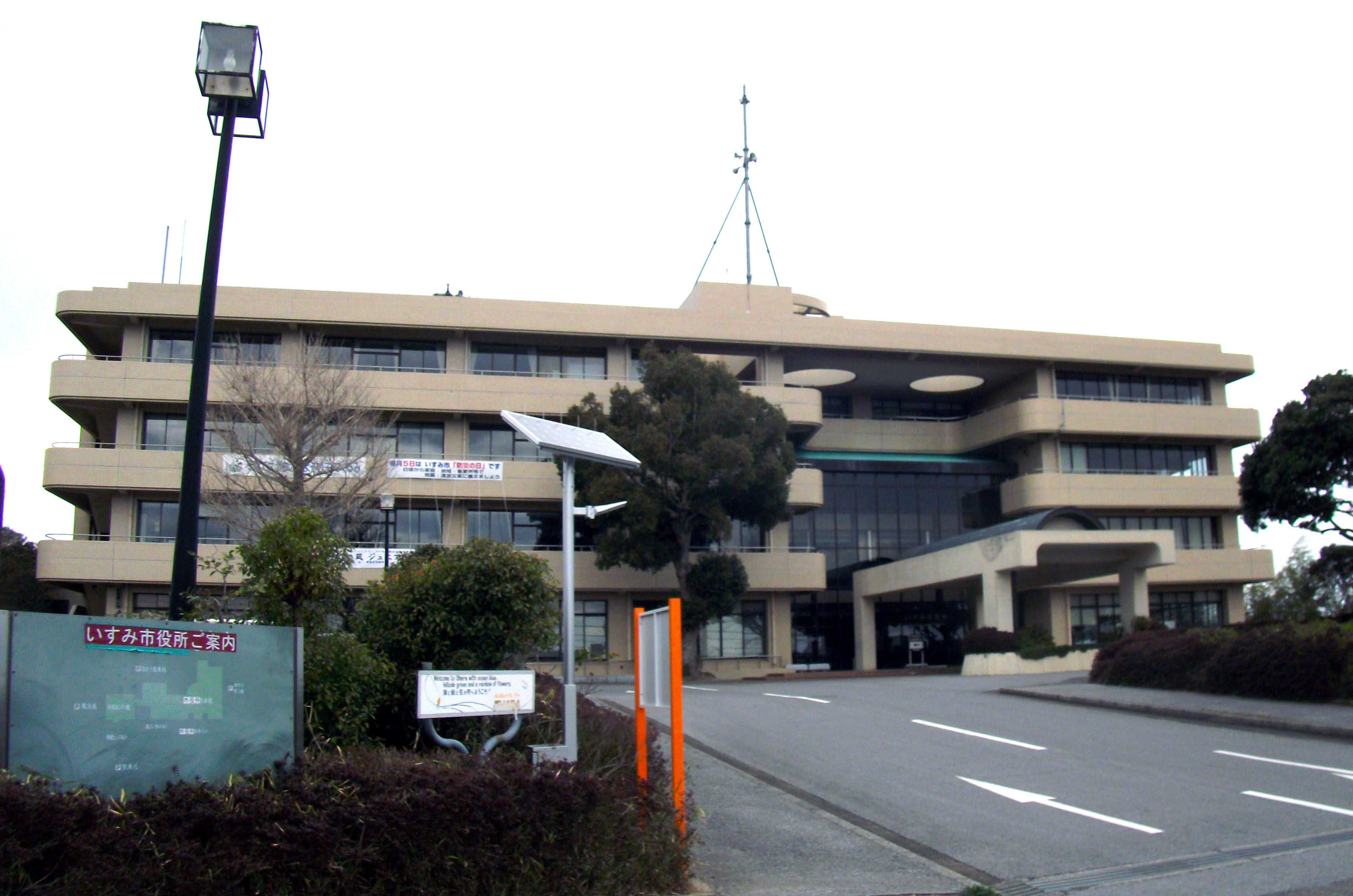 いすみ市役所